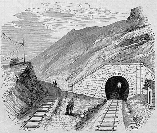 «Tunnel dos Terremotos»